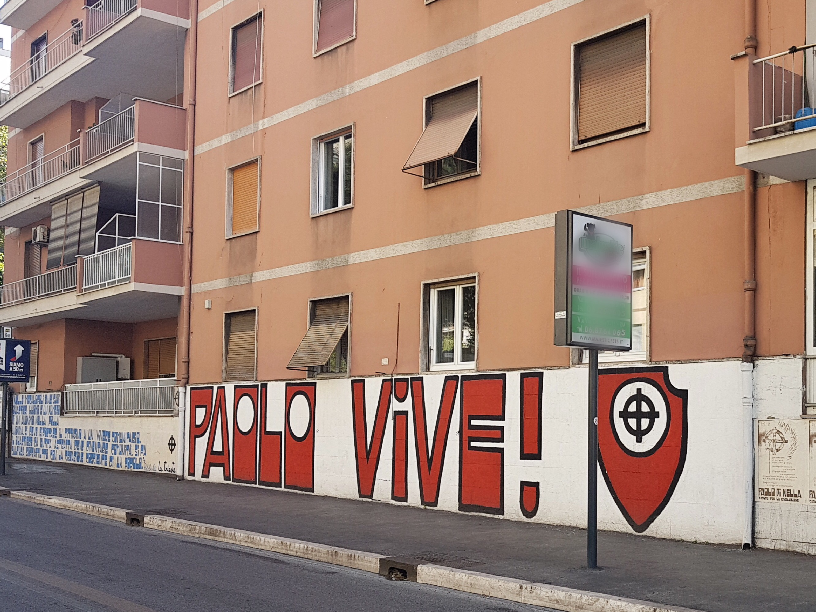 Murales sul luogo di uccisione di Paolo Di Nella nel 1978 a Roma, in Viale Libia.